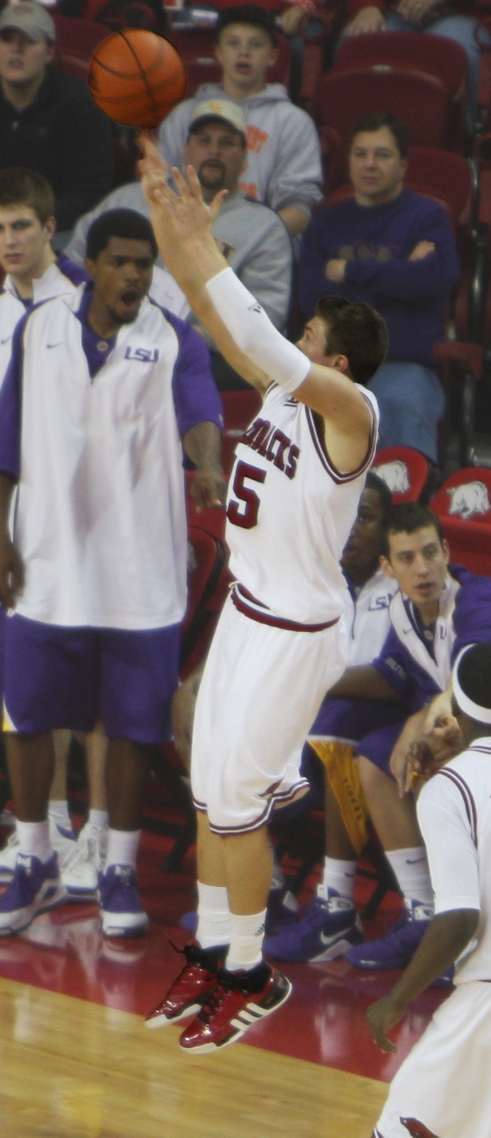 Arkansas basketball player Rotnei Clarke attempt against LSU on February 18, 2009.